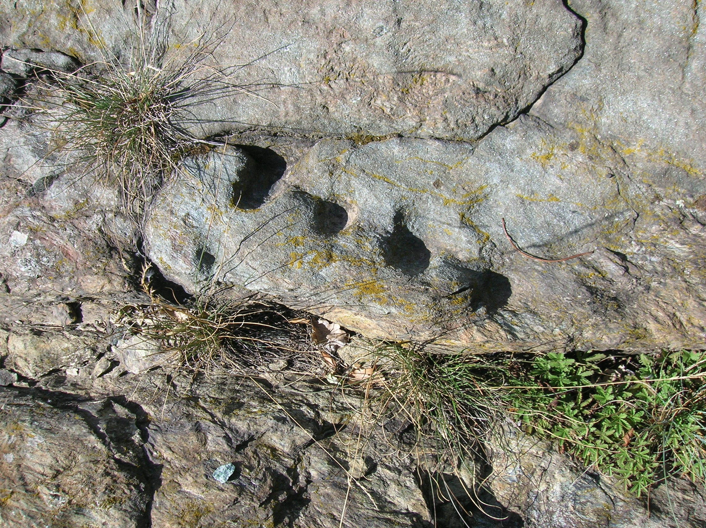 coppelle nel Geosito Ponte romano - Tsailleun, Saint-Vincent, Valle d'Aosta, Italia. This is a photo of a monument which is part of cultural heritage of Italy.